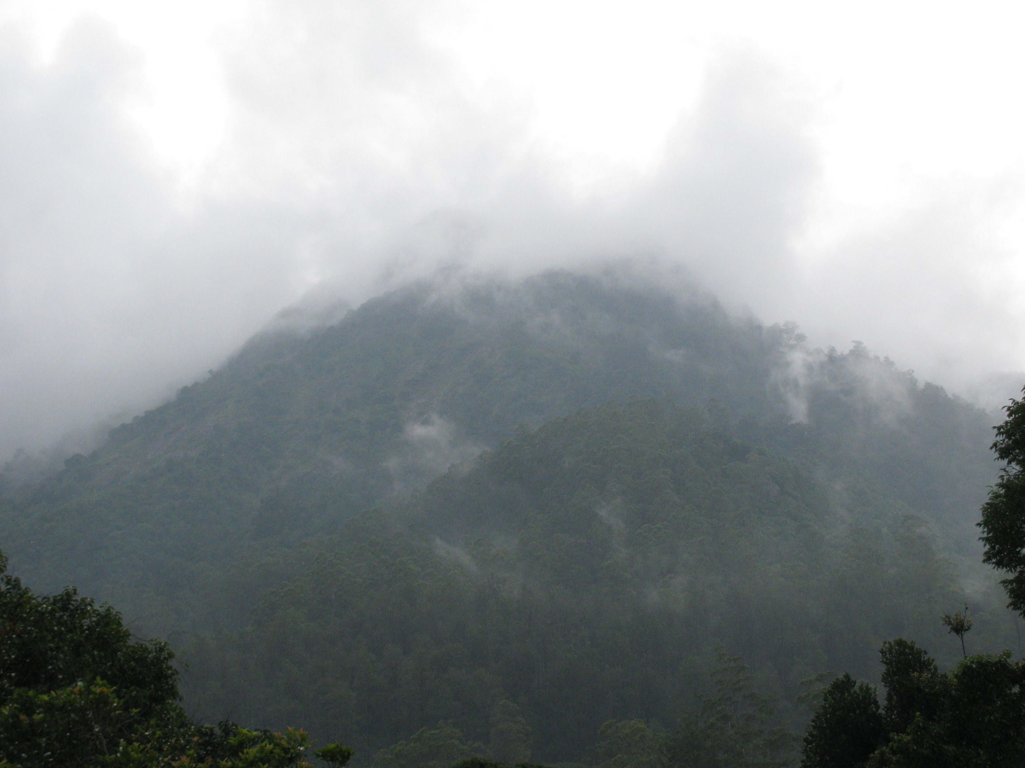 தென்னிந்திய சிரபுஞ்சி என அழைக்கப்படும் வருடத்தின் பெரும்பாலான நாட்கள் மழைப்பொழியும் மழைக்காடு